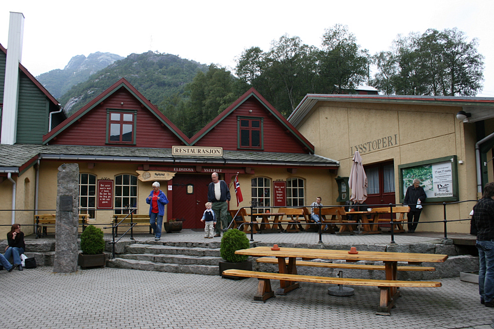 Byrkjedalstunet